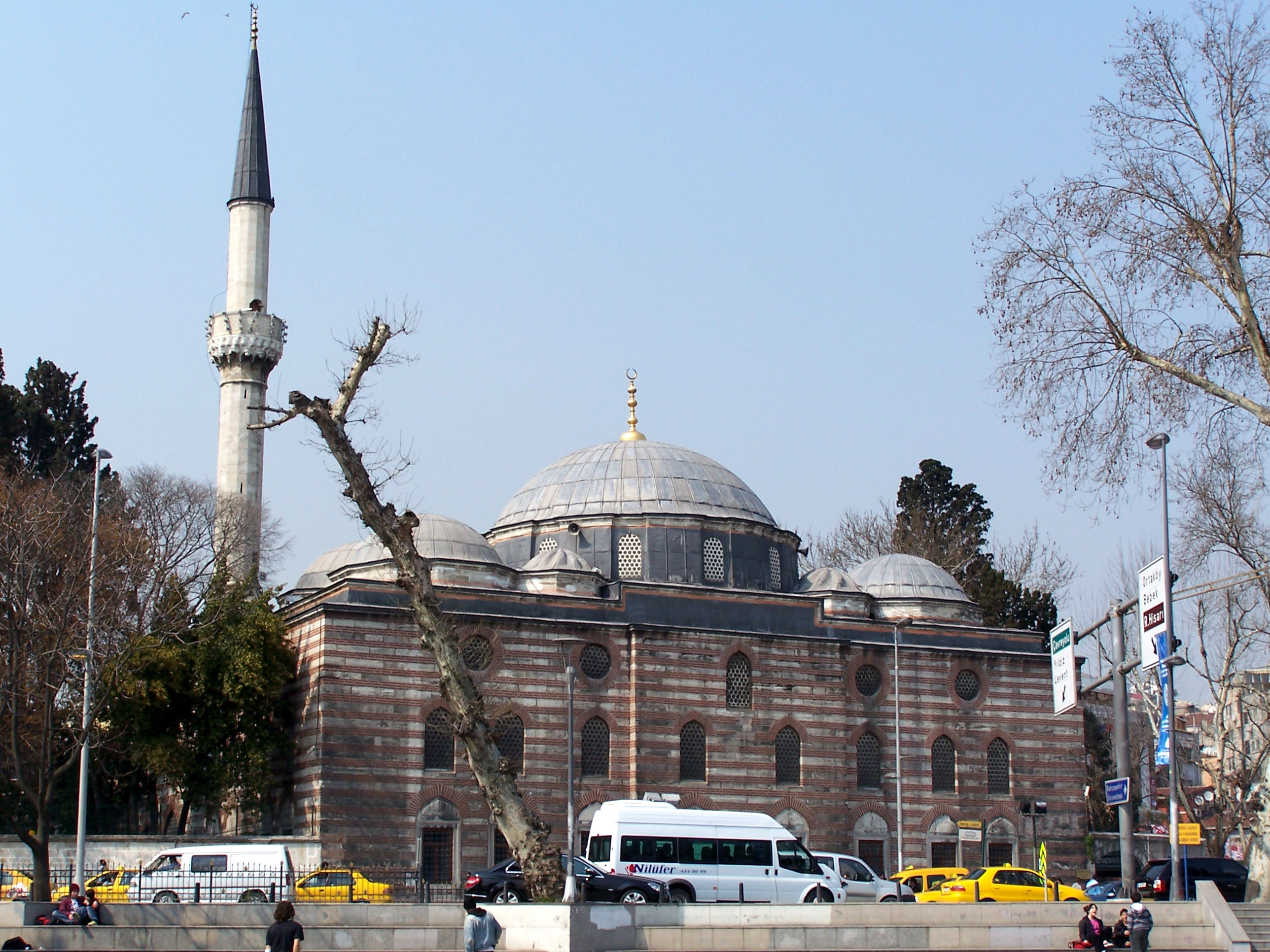 Sinan Paşa Camii in Beşiktaş, İstanbul, Turkey